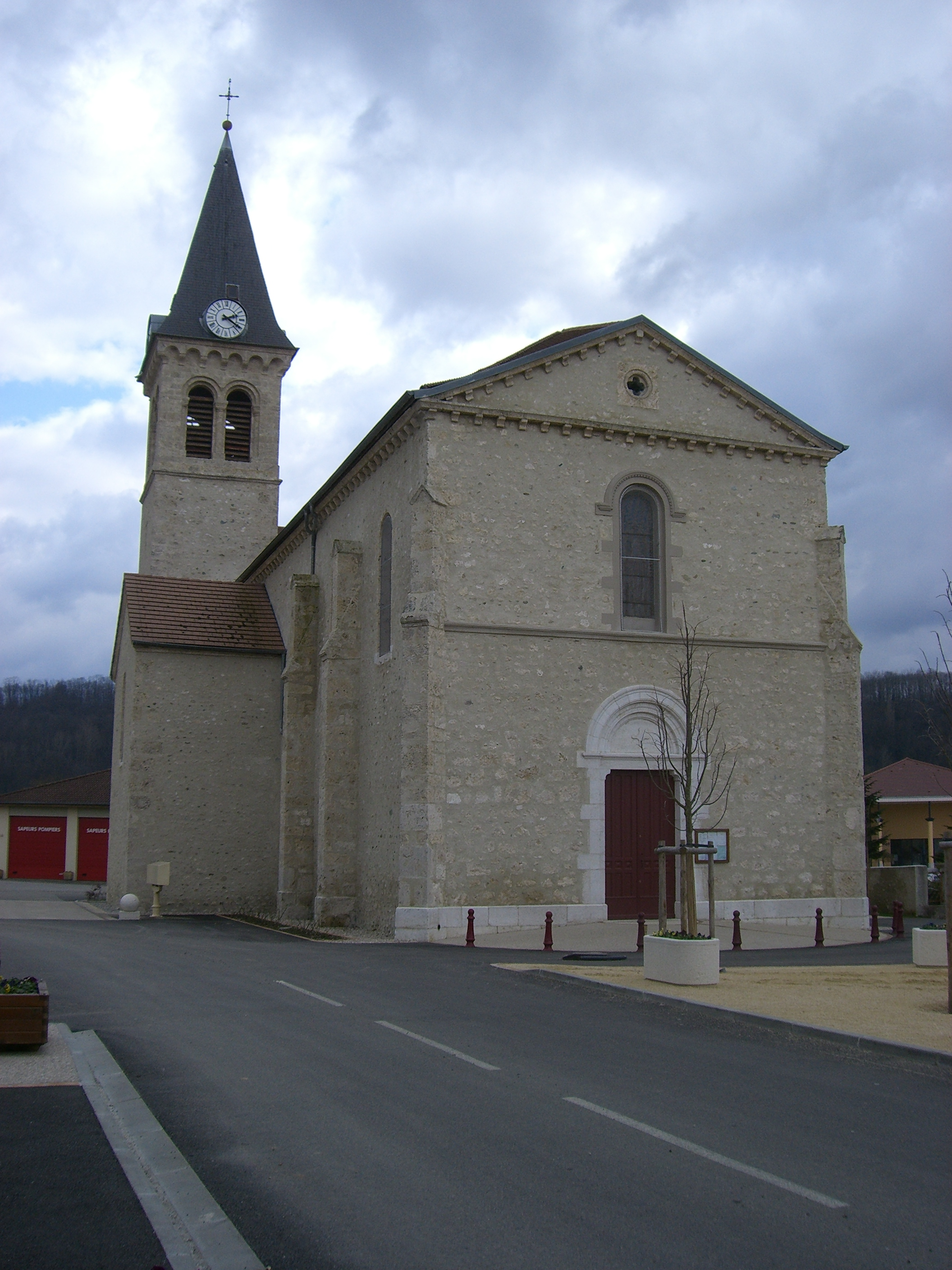 L'église de Saint-Just-de-Claix.